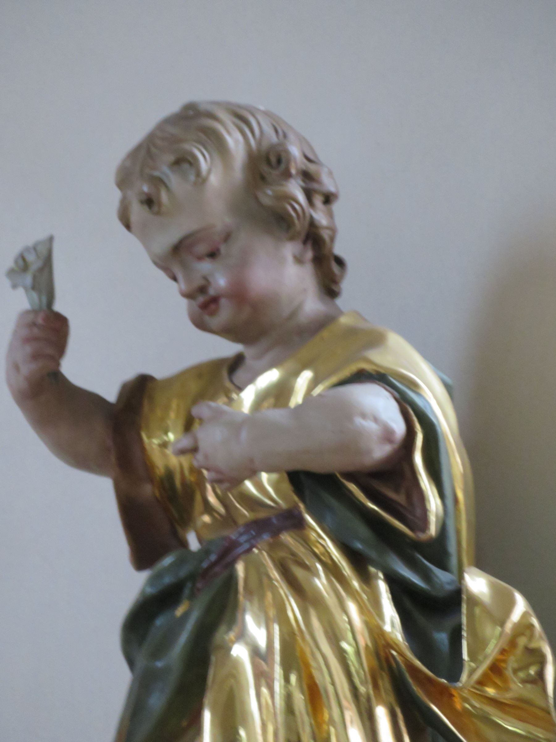 Wallfahrtskirche Oberbiederbach